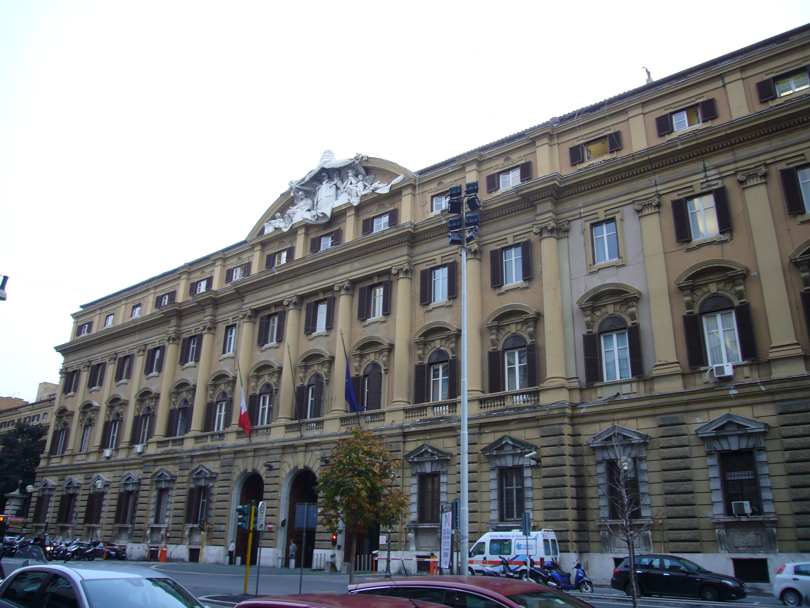 Roma, Ministero delle Finanze a via XX Settembre